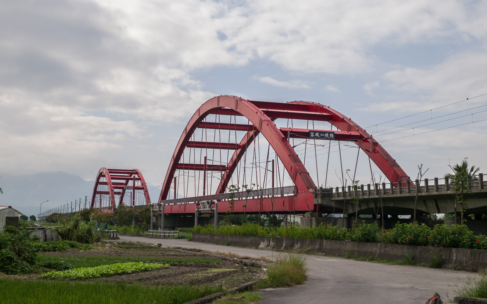 玉里客城鐵橋